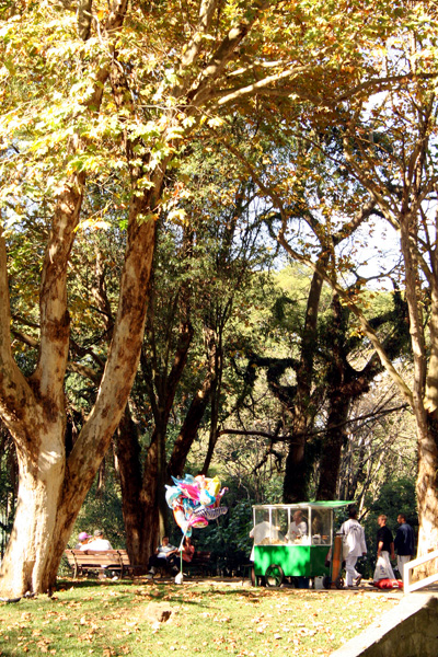 Passeio Público, Curitiba, Brasil. Parque mais antigo de Curitiba, inaugurado em 02 de maio de 1886 e localizado em sua área central. (Passeio Público, the oldest park in Curitiba, Brasil. It was founded in 1886).